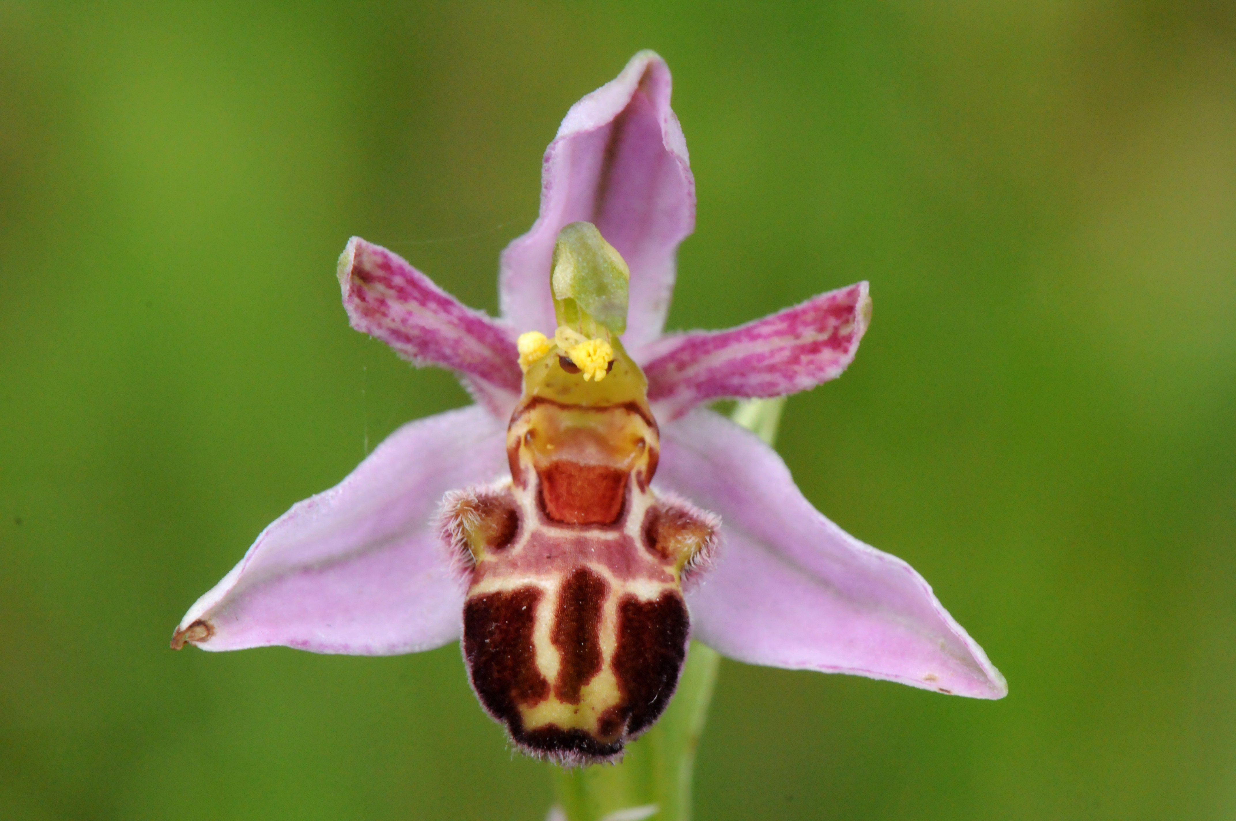 Orchidée montagne de Beaune